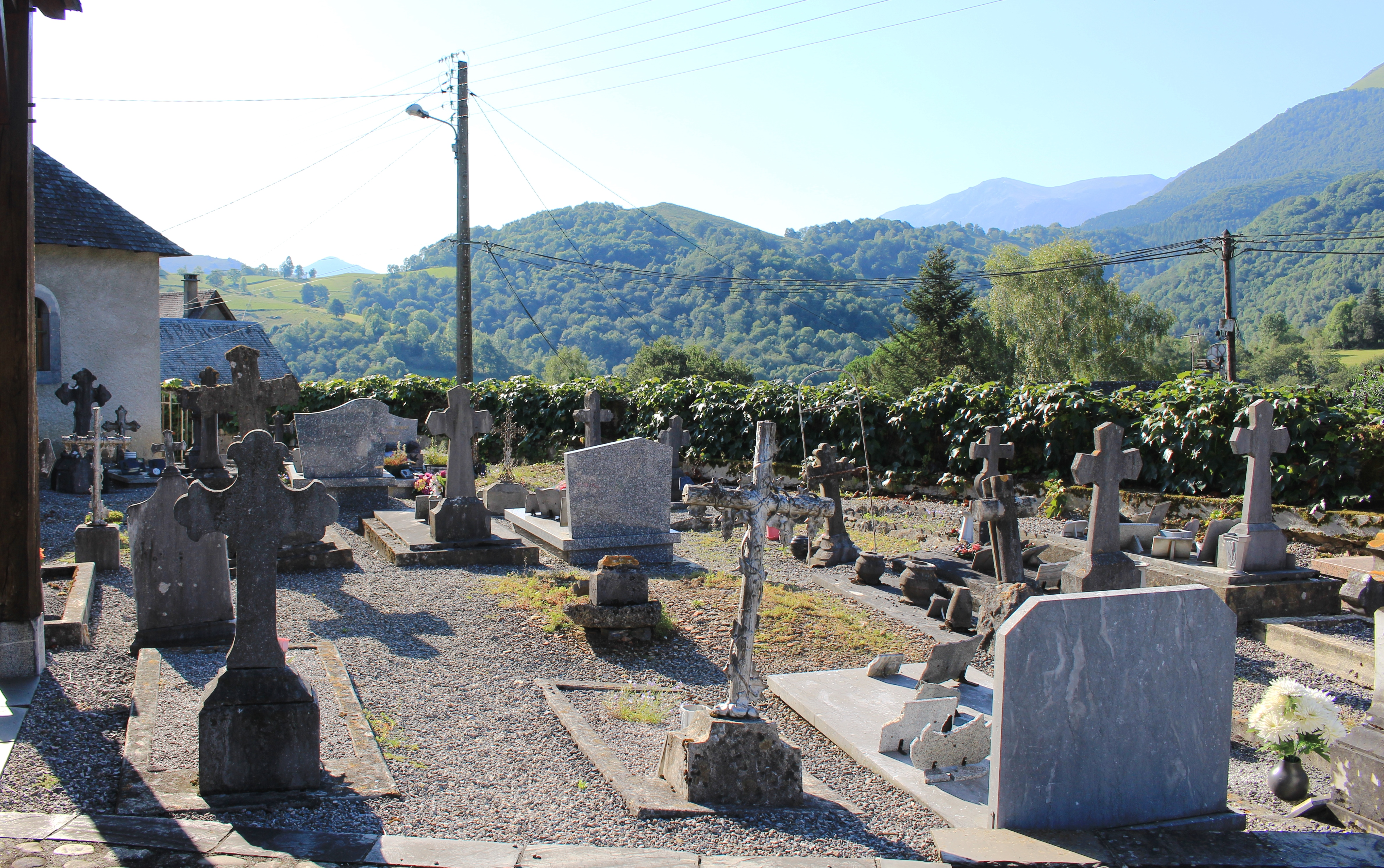 Cimetière de Marsas (Hautes-Pyrénées)